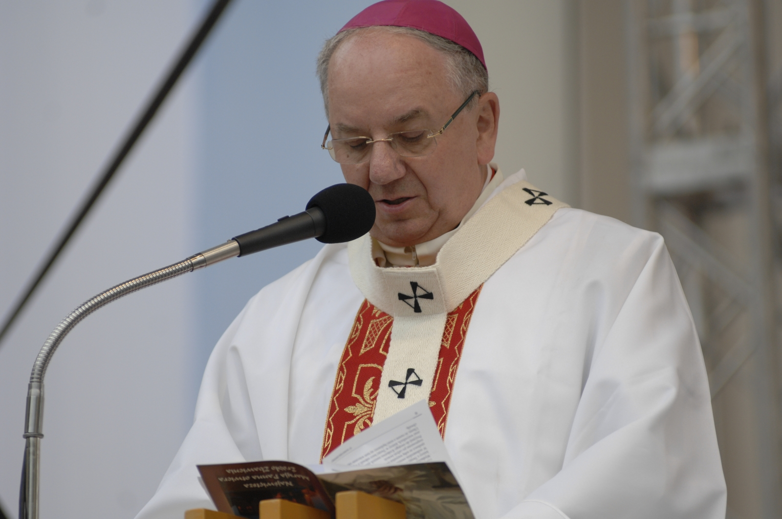 Arcybiskup lubelski Stanisław Budzik